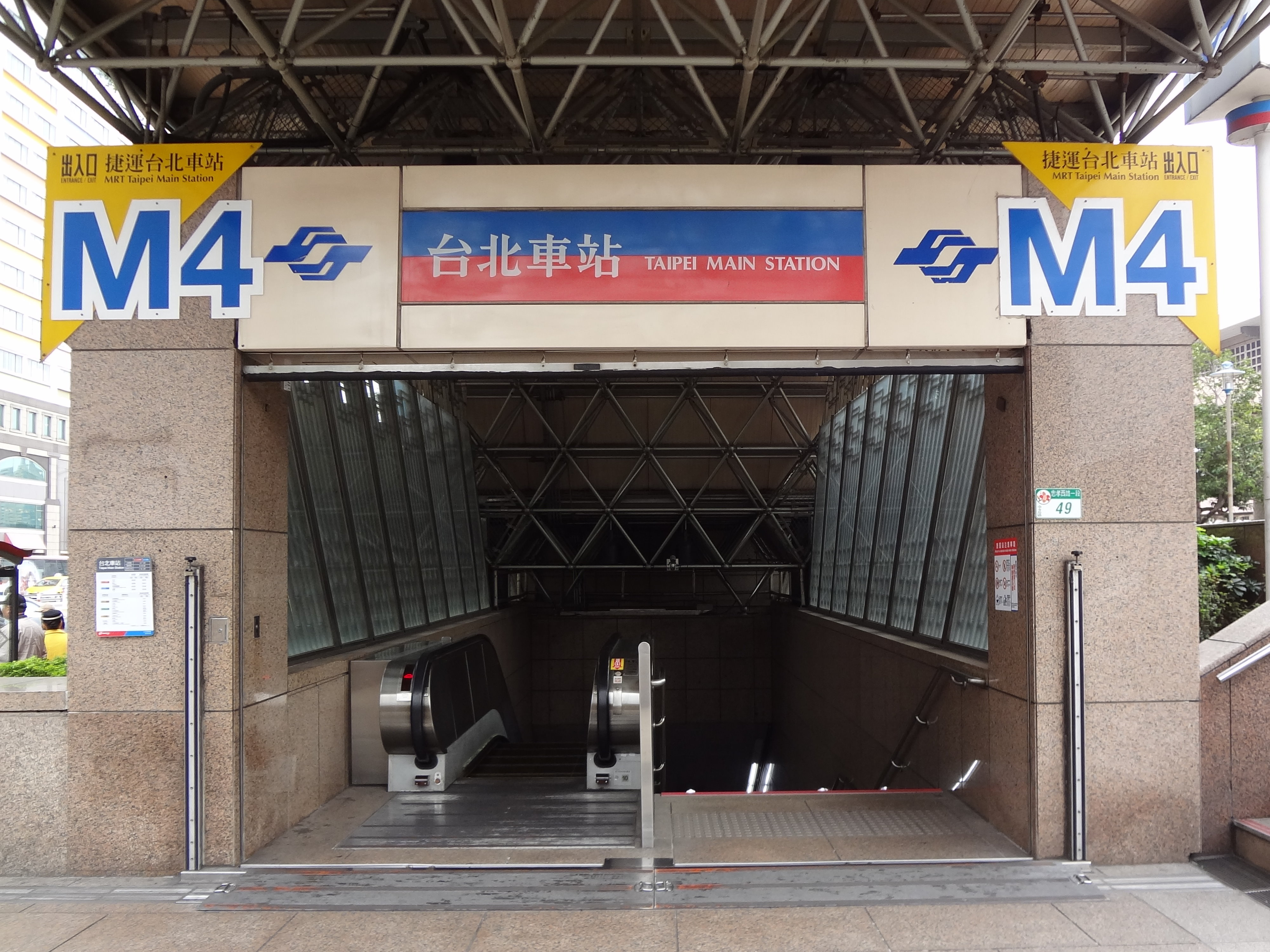 臺北捷運臺北車站M4出口。